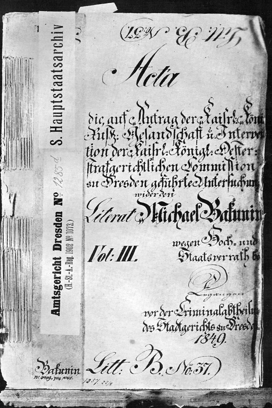 Die Akten zum Prozess von 1849 gegen Michail Bakunin in Dresden.